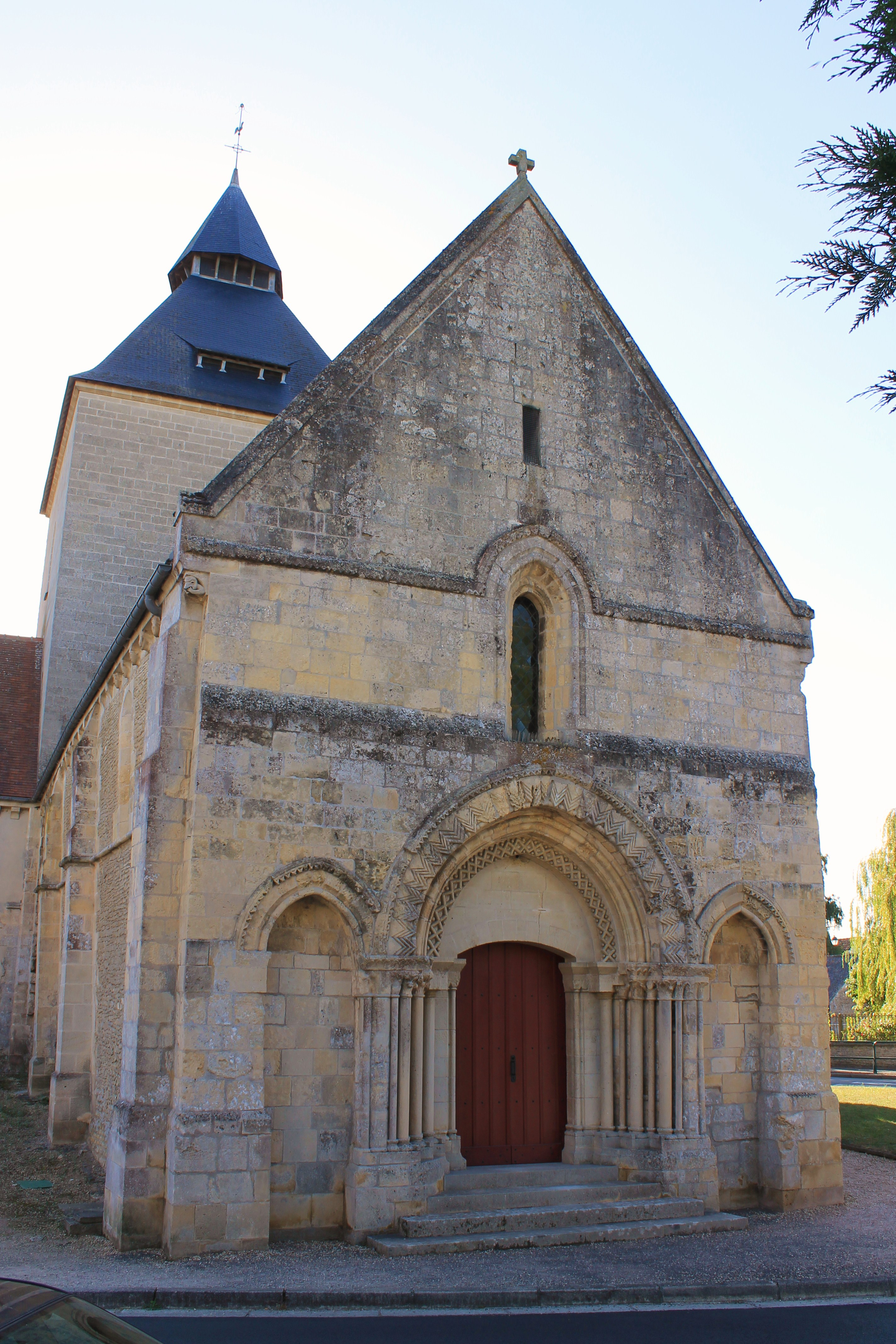 Eglise Saint-Germain à Airan (Calvados)